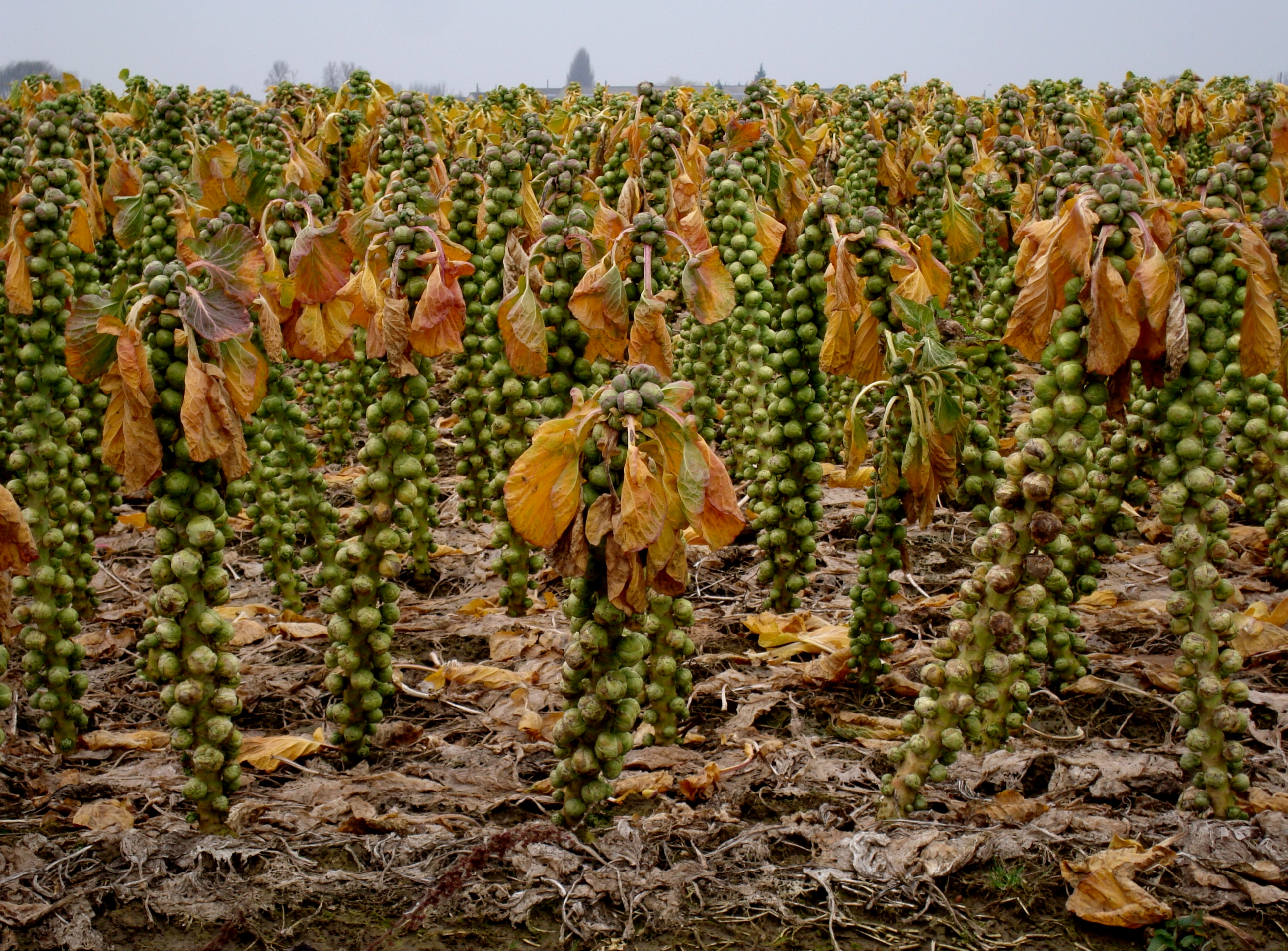 Champ de choux de Bruxelles à Verlinghem (Nord).